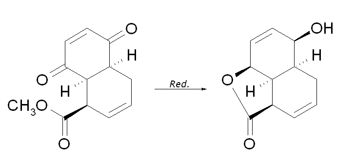 Zweiter Schritt der Reserpin-Totalsynthese nach Woodward: Reduktion des endo-Addukts zum Lacton.